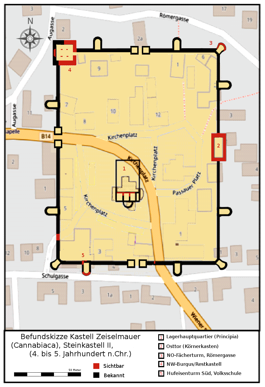 Befundplan des Kastel Cannabiaca (Zeiselmauer), Steinkastell II, 4. Jahrhundert n.Chr. Vorlage: Verena Gassner, Andreas Pülz (Hrsg.): Der römische Limes in Österreich. Führer zu den archäologischen Denkmälern. Verlag der Österreichischen Akademie der Wissenschaften, Wien 2015, ISBN 978-3-7001-7787-6, S. 235.